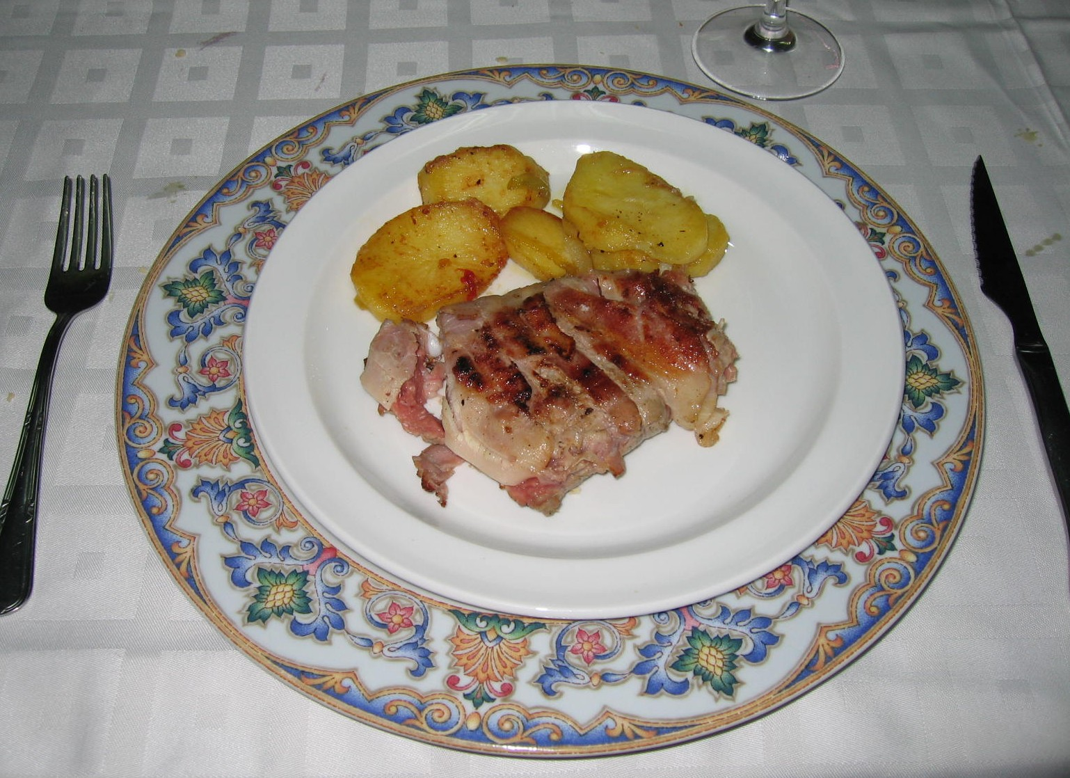 Turnedo en la Sociedad Gastronómica El Rinconín, fundada en Oviedo (España) en 1965